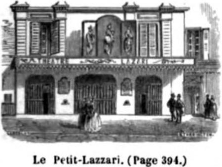 The "Théâtre du Petit-Lazzari" in Paris, France, 1800s